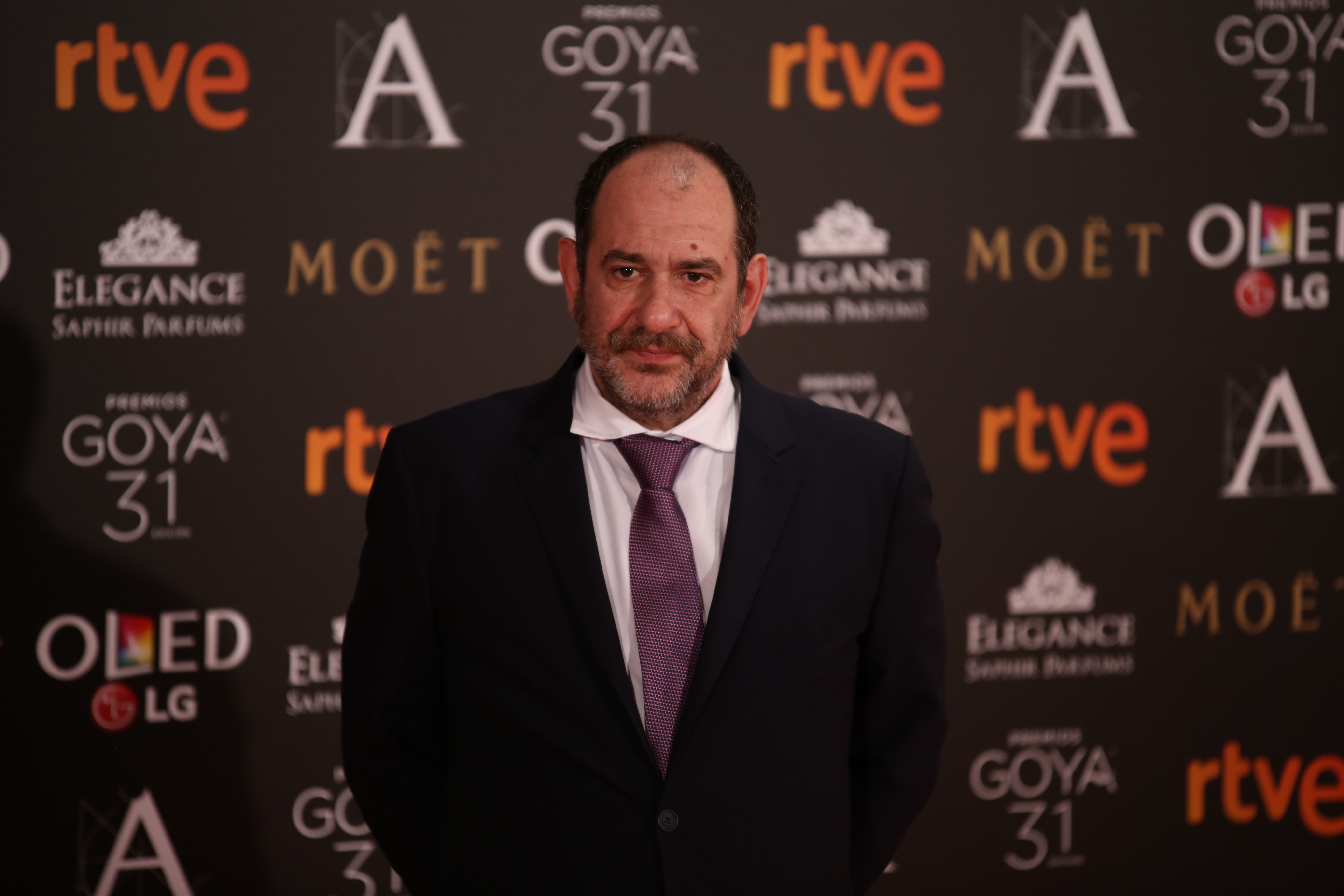 Premios Goya 2017